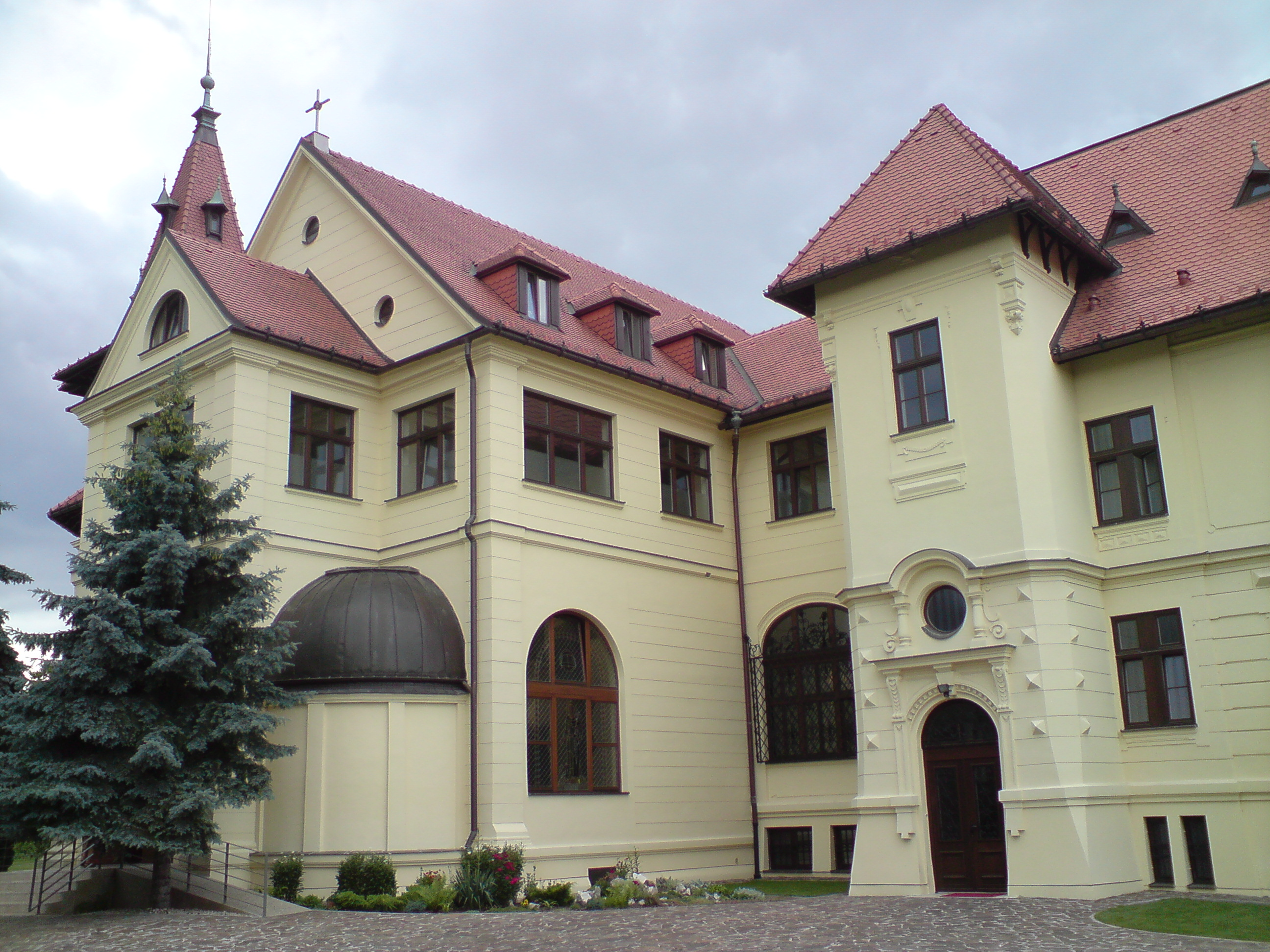 Csákyho kaštieľ v Prievoze